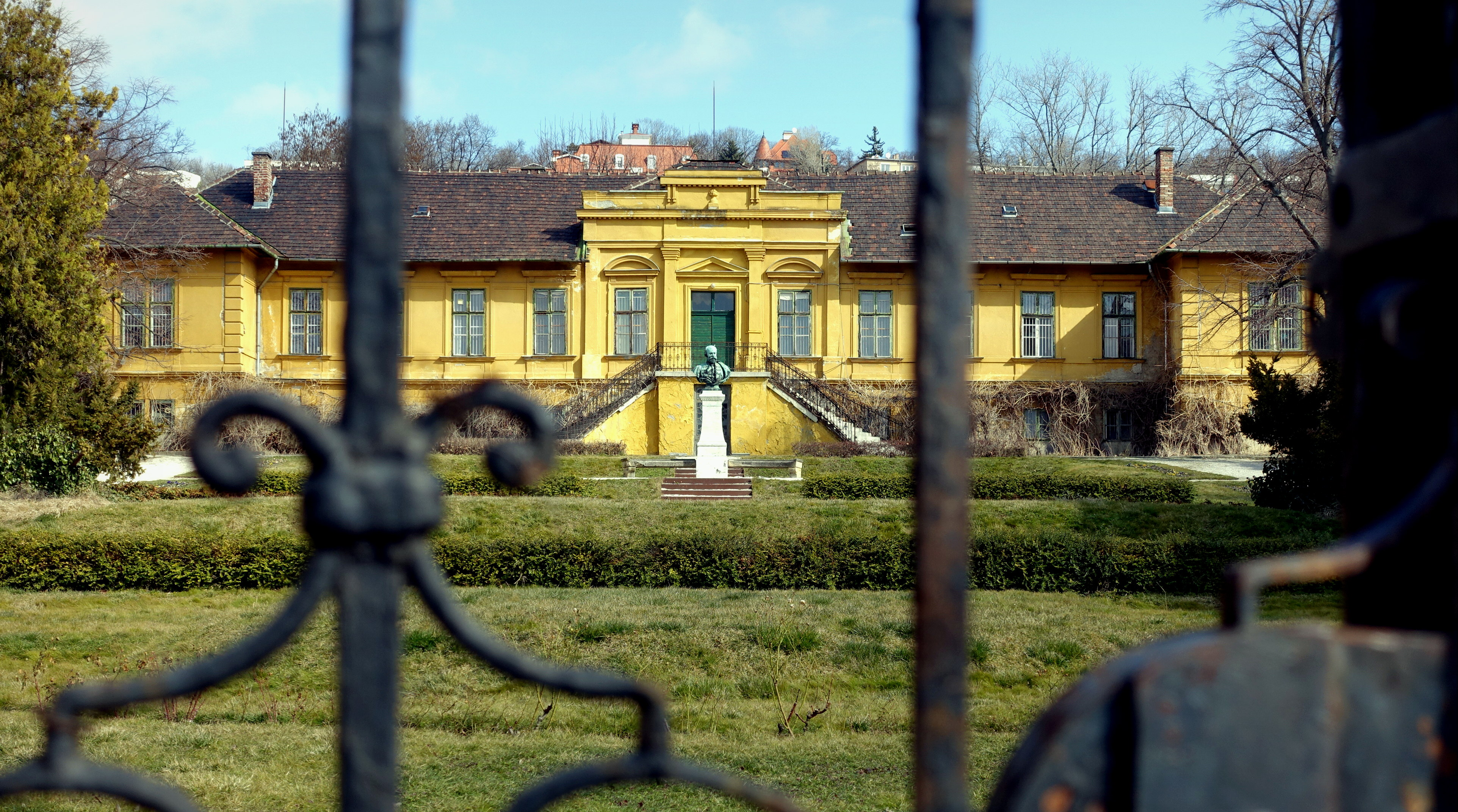 Budai arborétum (felső telek)